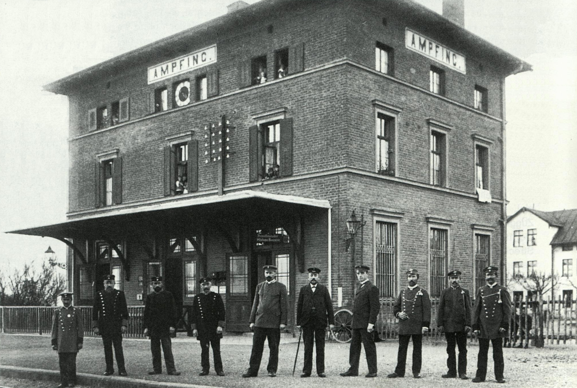 Empfangsgebäude des Bahnhofs Ampfing von der Gleisseite, davor das versammelte Stationspersonal.